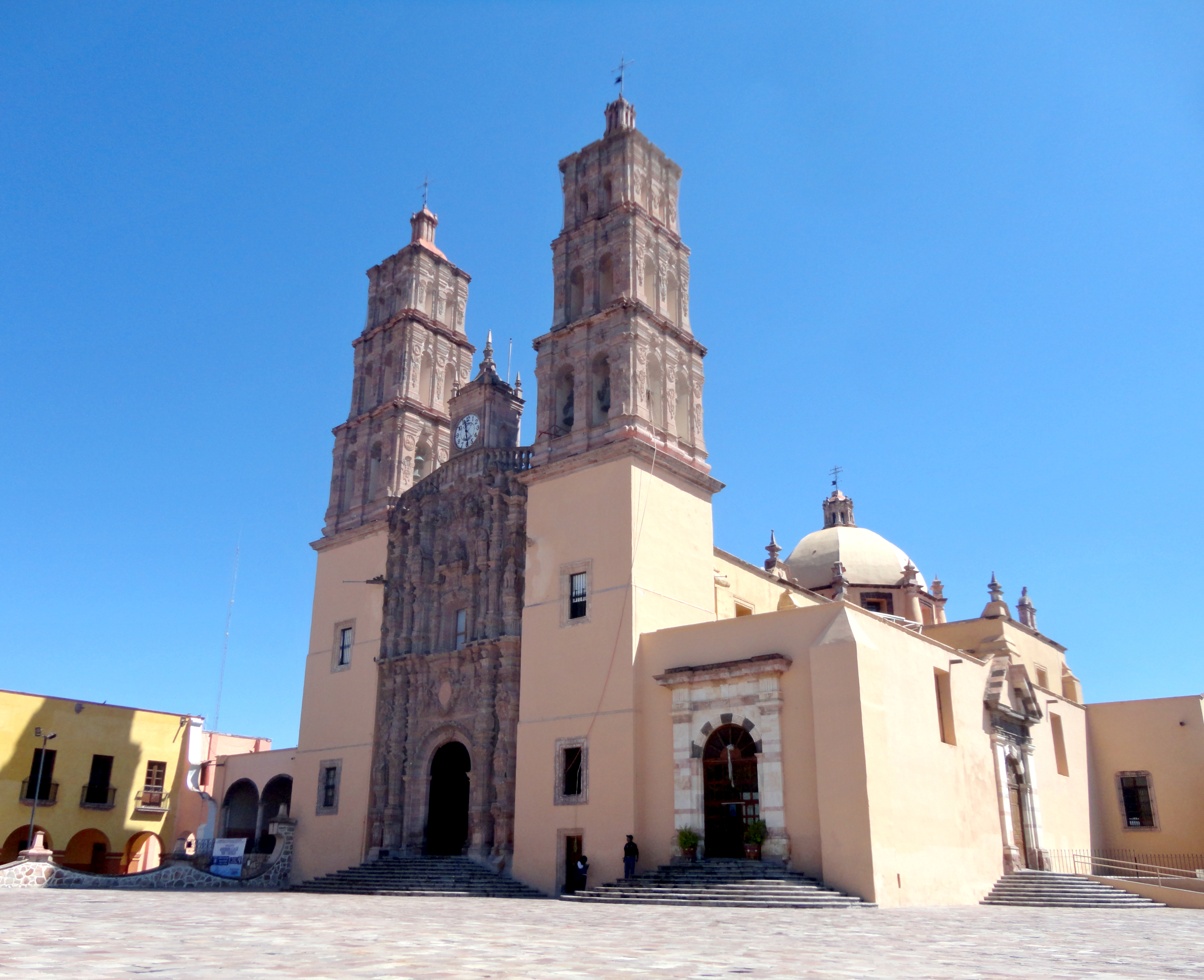 Parroquia de Nuestra Señora de los Dolores. Dolores Hidalgo, Guanajuato, México.